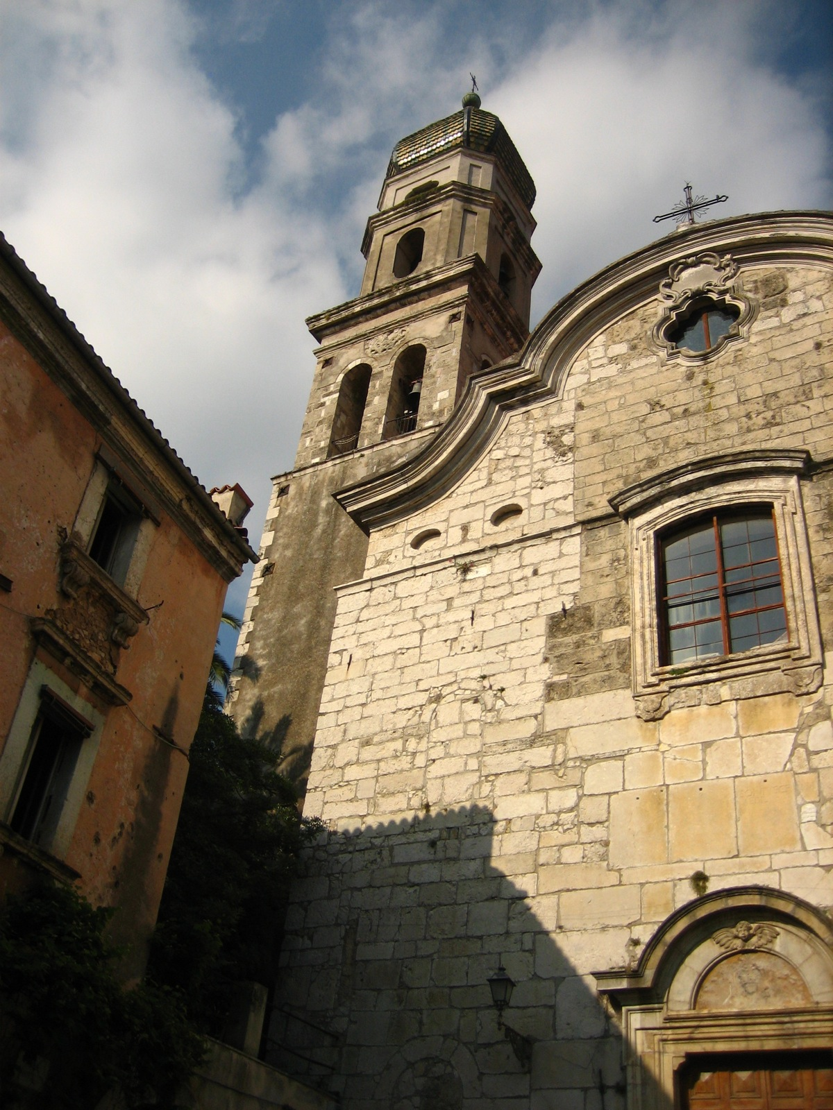 Chiesa dell'Annunziata, Venafro, Isernia, Italy